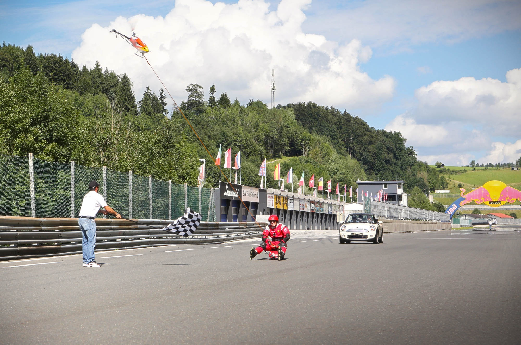 RC-Helikopterstunt von HeliGraphix auf dem Salzburgring. Die Rennstrecke wurde extra einen halben Tag für den Stunt für die Allgemeinheit gesperrt. Mit dem vom RC-Heli gezogenen Bobbycar wurde eine Endgeschwindigkeit von 75 km/h erreicht.